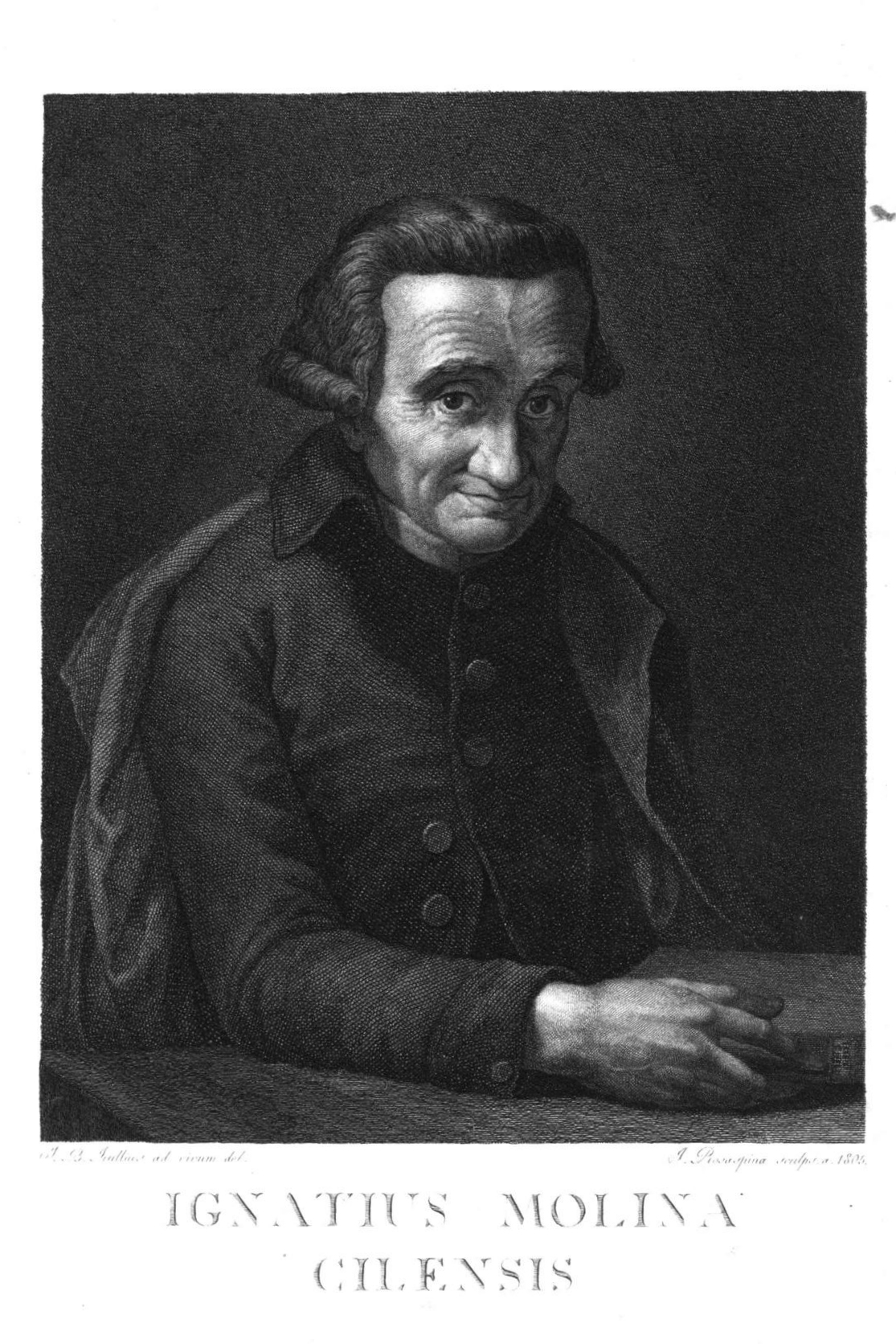 Francesco Rosaspina (1762-1841) Ritratto a stampa di Ignatius Molina Cilensis (Juan Ignacio Molina)